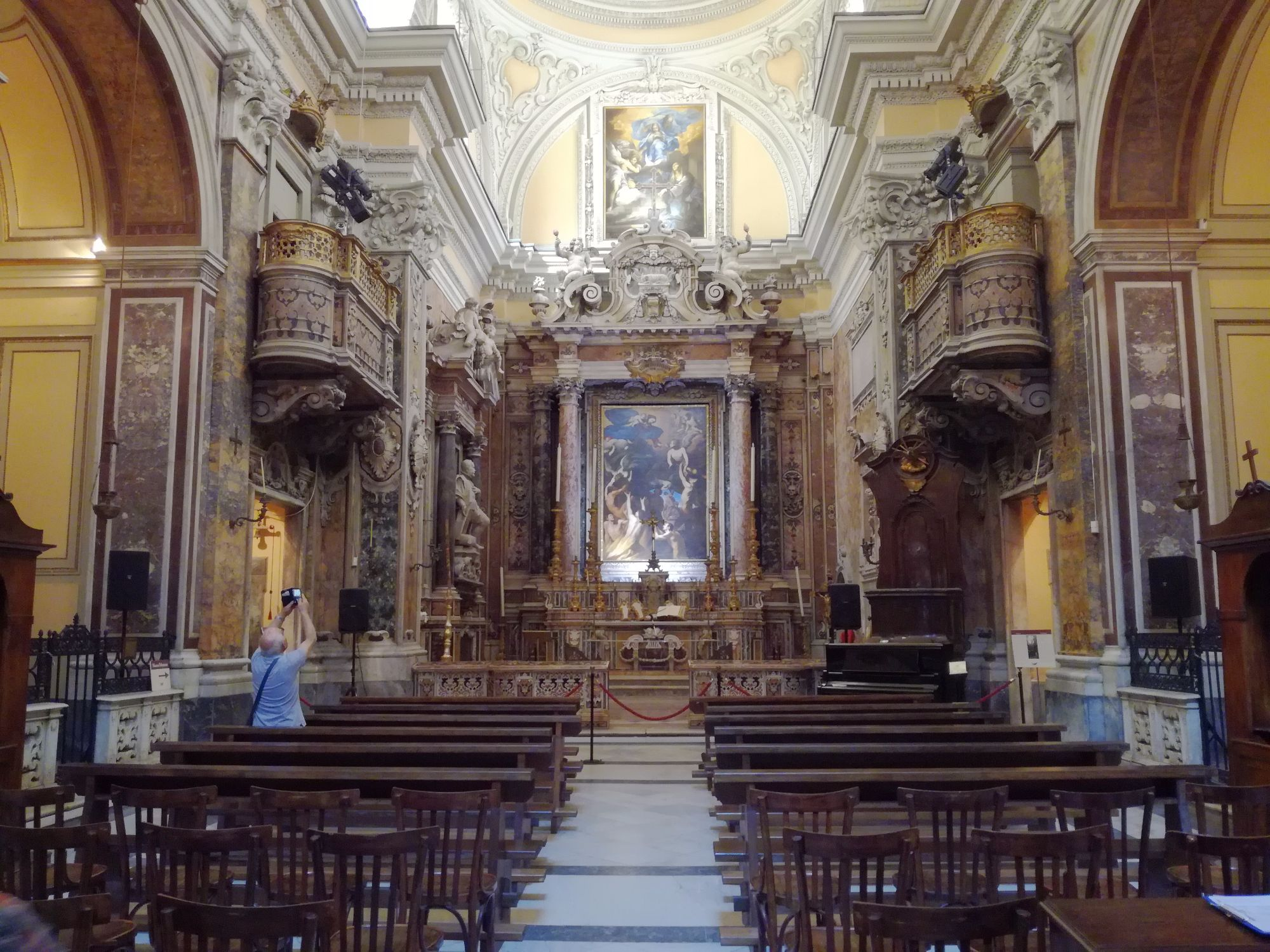 Interno Purgatorio ad Arco